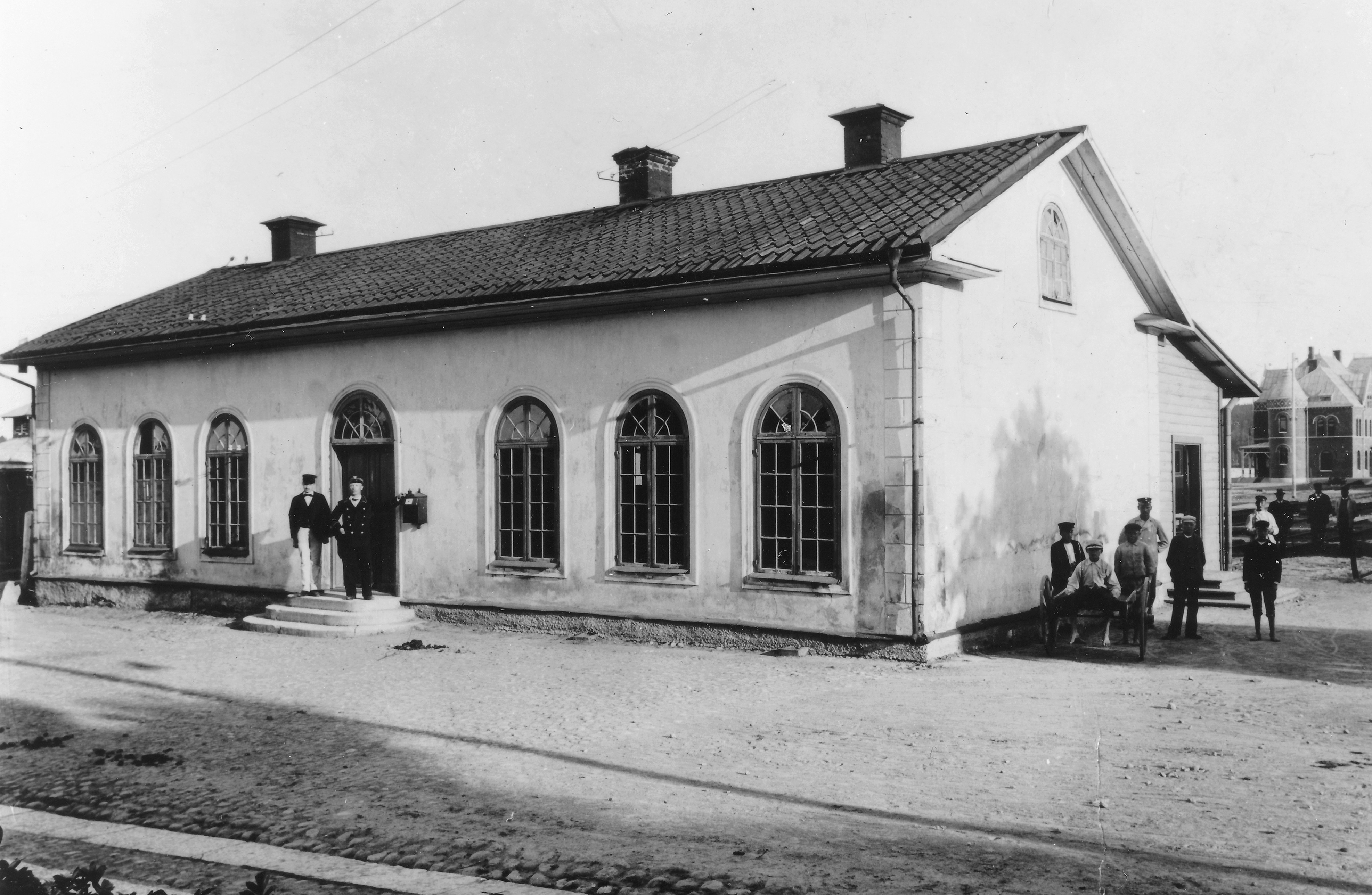 Nora Nora stad Nora gamla stationshus. Gamla stationshuset uppfört år 1855 rivet år 1900.